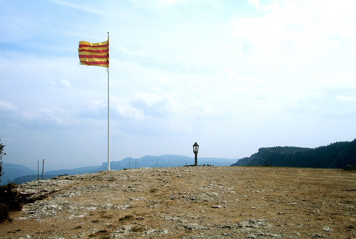 Cim de Puigsagordi, entre Balenyà i Centelles, Osona